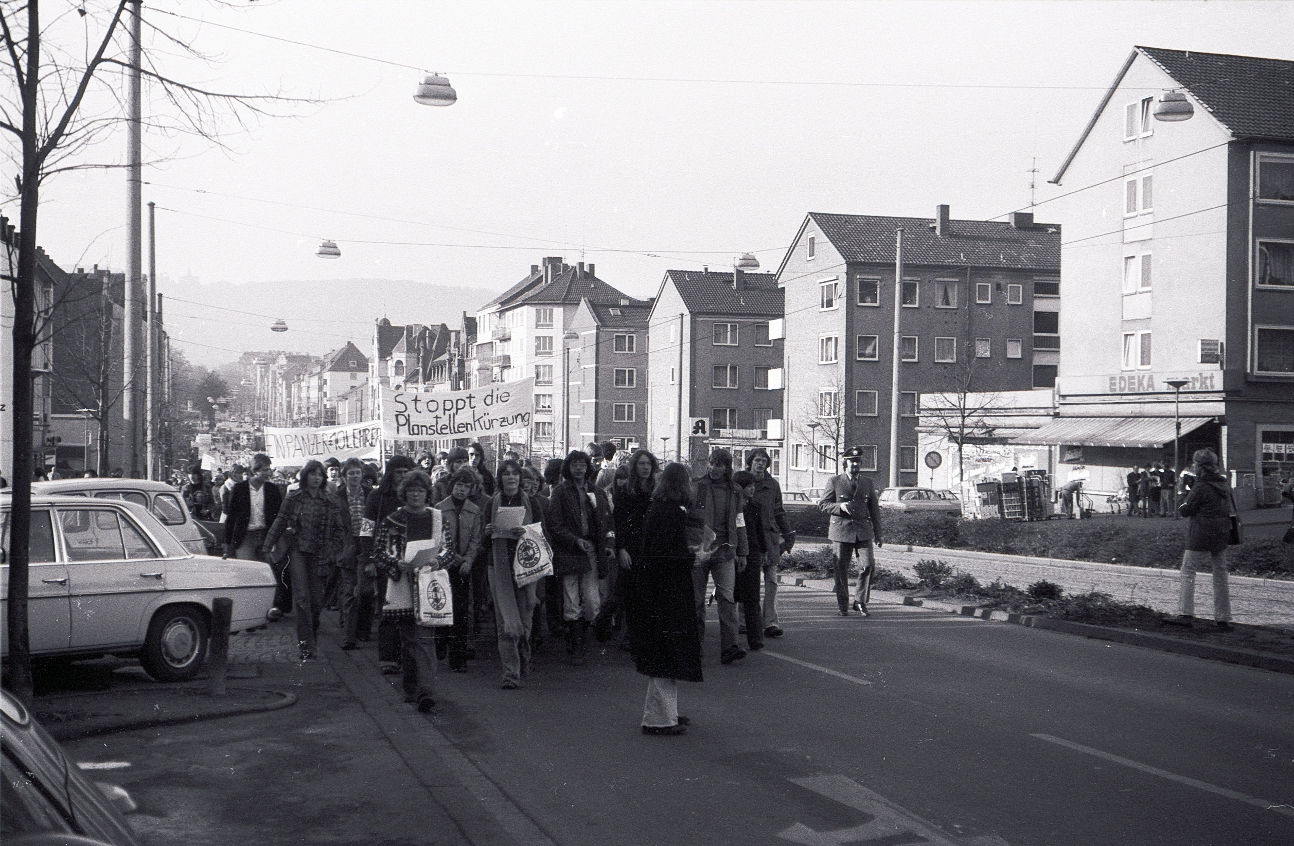 Schüler mehrerer Schulen (Wilhelmsgymnasium, Heinrich Schütz Schule) auf dem Weg zur Abschlusskundgebung in der Innenstadt. Eine Demonstration für mehr Lehrer.